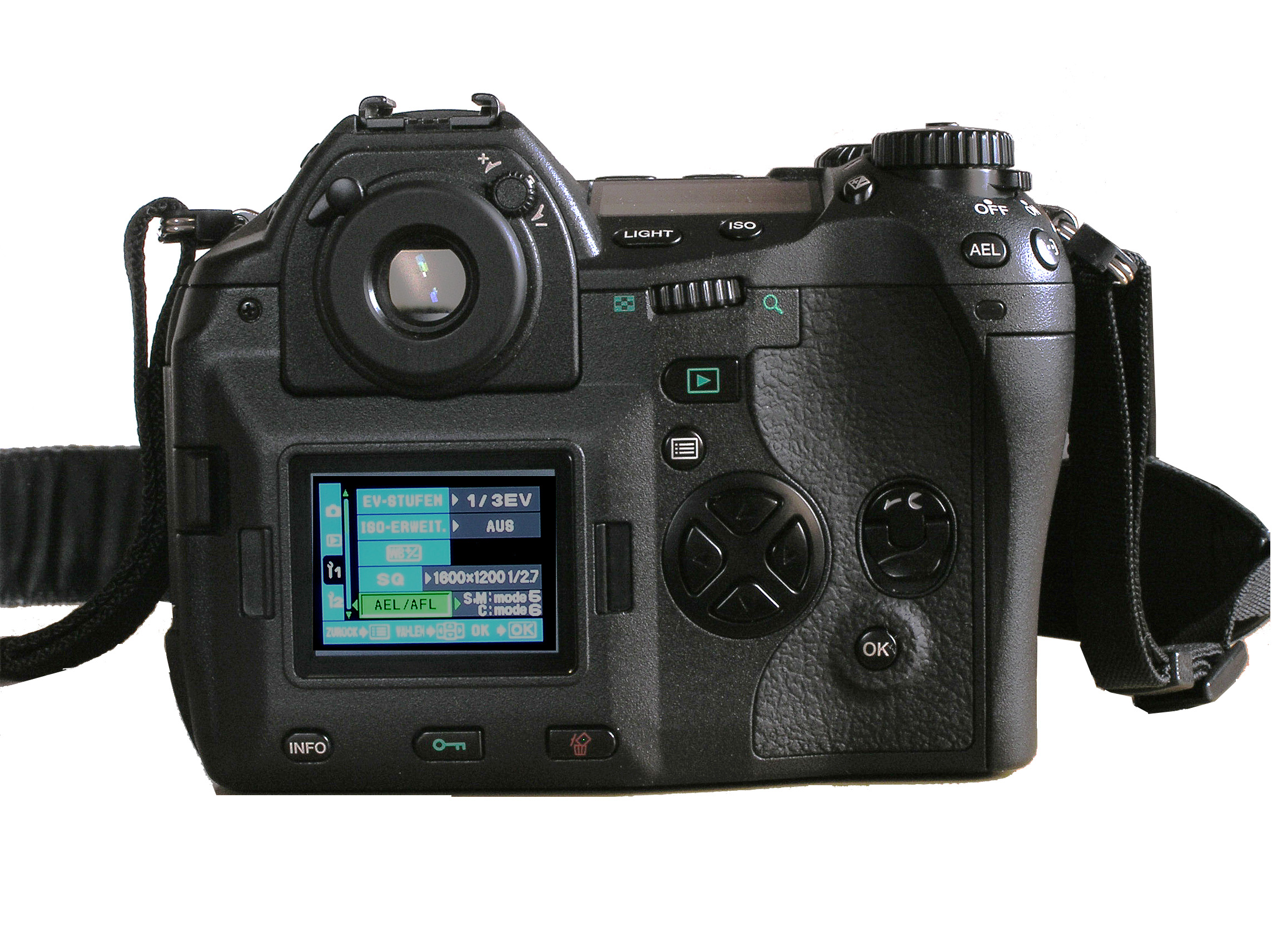 Olympus E-1 von hinten